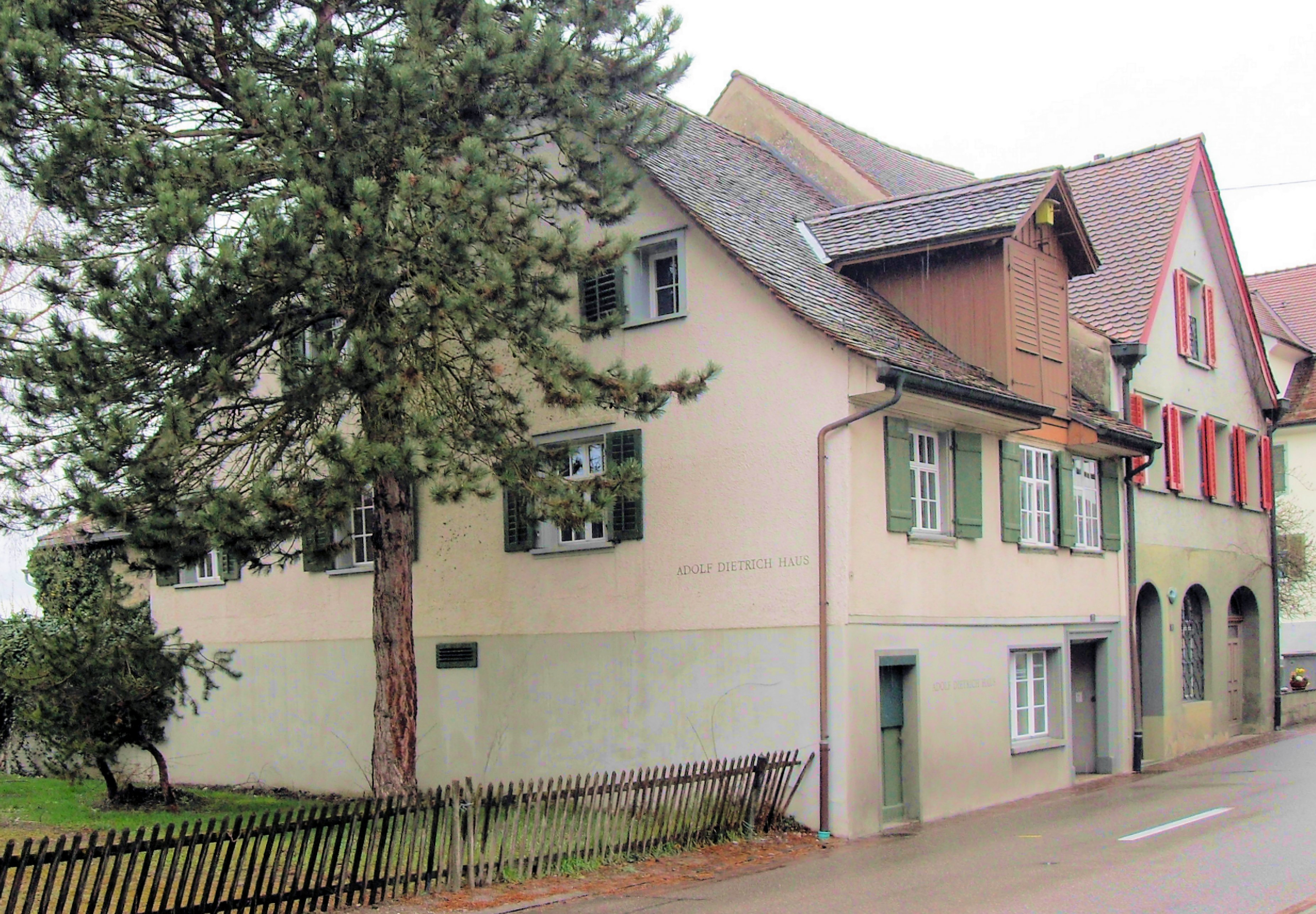 Geburts-, Arbeits- und Wohnhaus von Adolf Dietrich in Berlingen, Kanton Thurgau, Schweiz